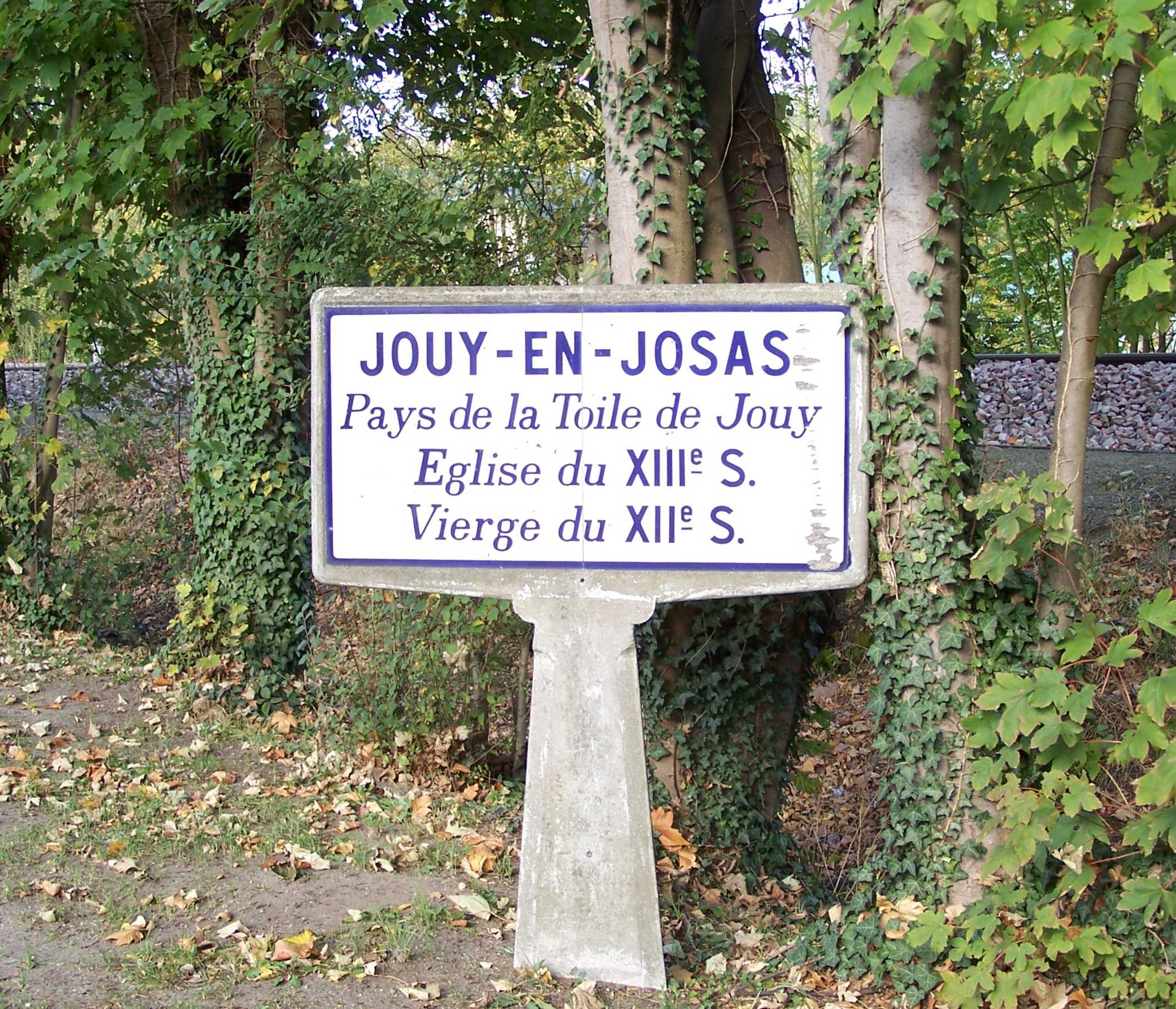 Panneau à l'entrée de Jouy-en-Josas (Yvelines, France)